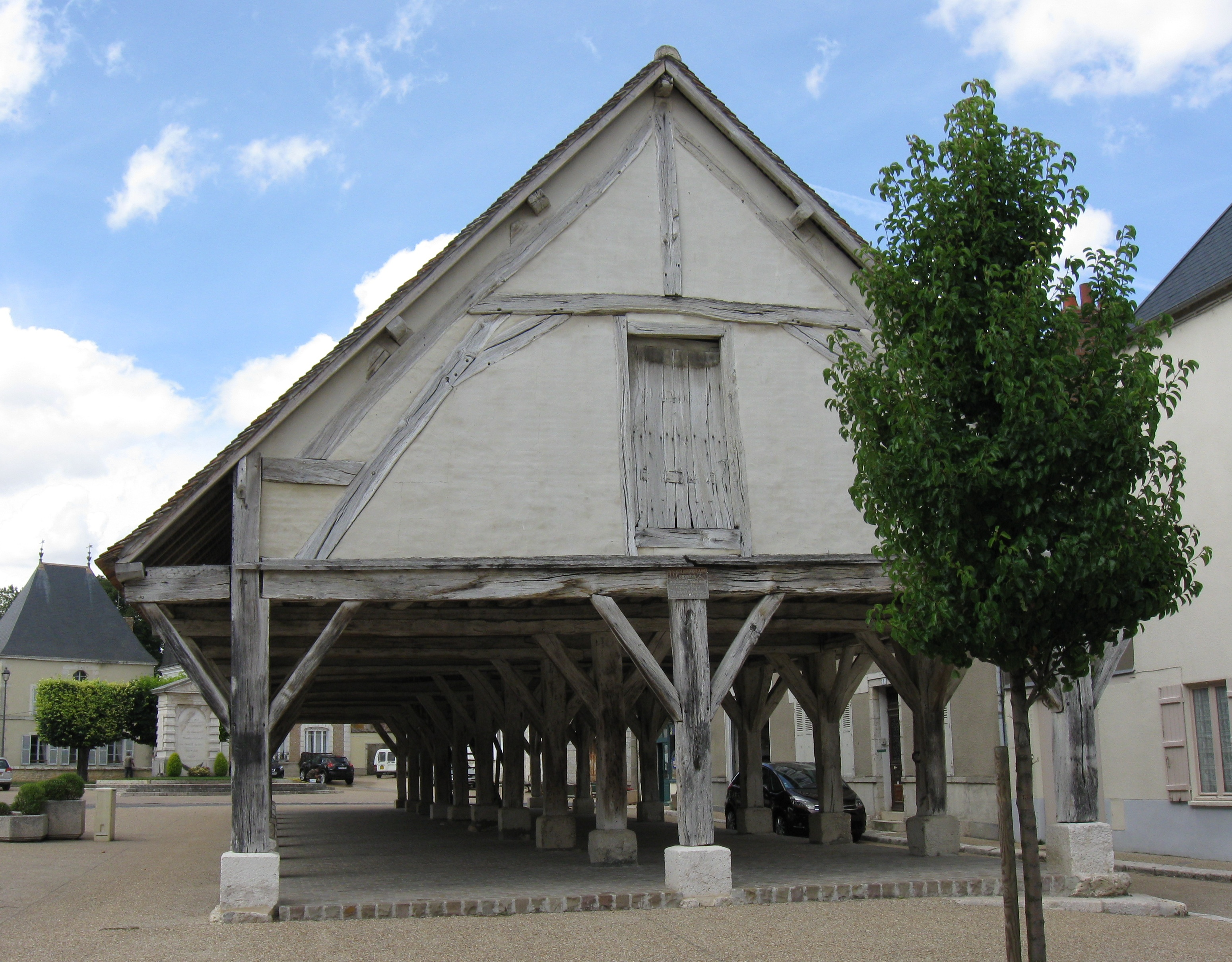 La halle de Beaumont-du-Gâtinais. (département de la Seine-et-Marne, région Île-de-France).